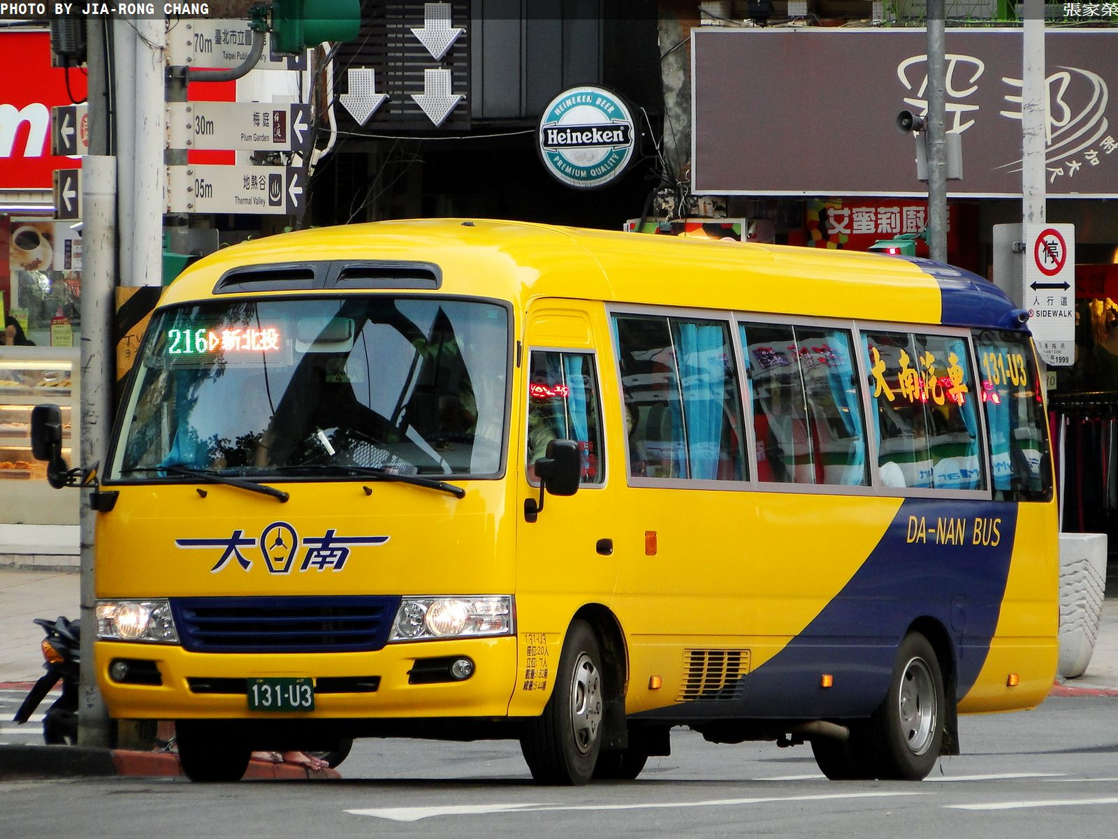 TOYOTA - XZB50L - 131-U3